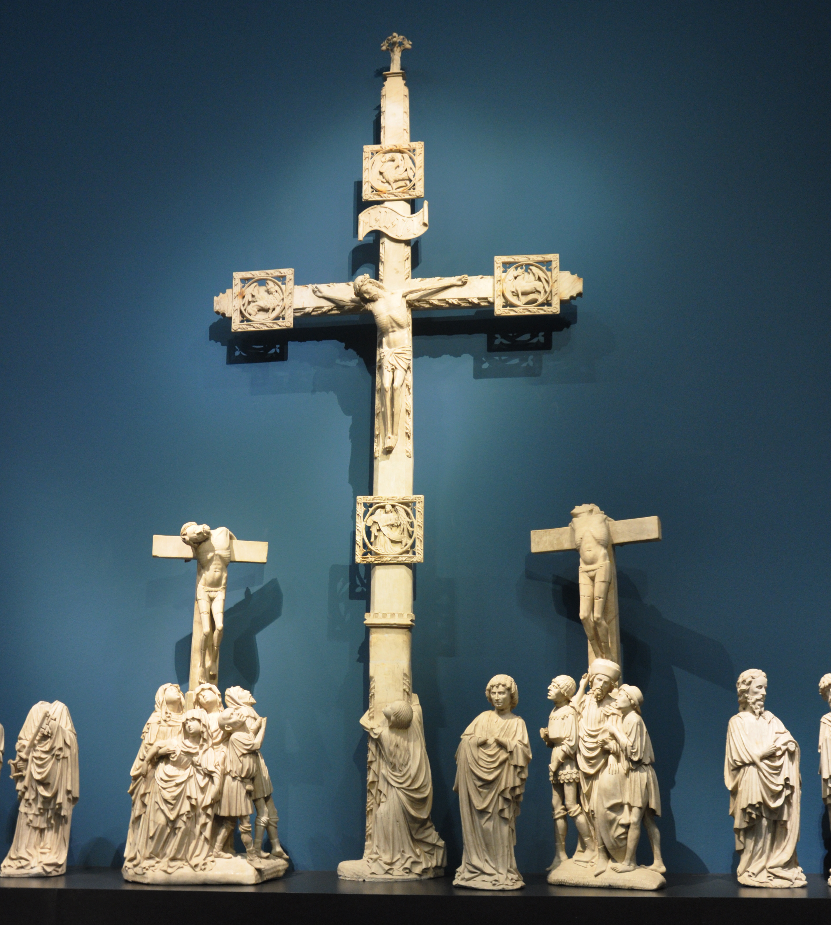 Meister des Rimini-Altars: Kreuzigungsaltar aus Rimini (Rimini-Altar); Südniederlande oder Nordfrankreich, um 1430; Alabaster, geringe Reste alter Fassung Liebieghaus, Frankfurt am Main, Inv. Nr. 400–418; Weblink